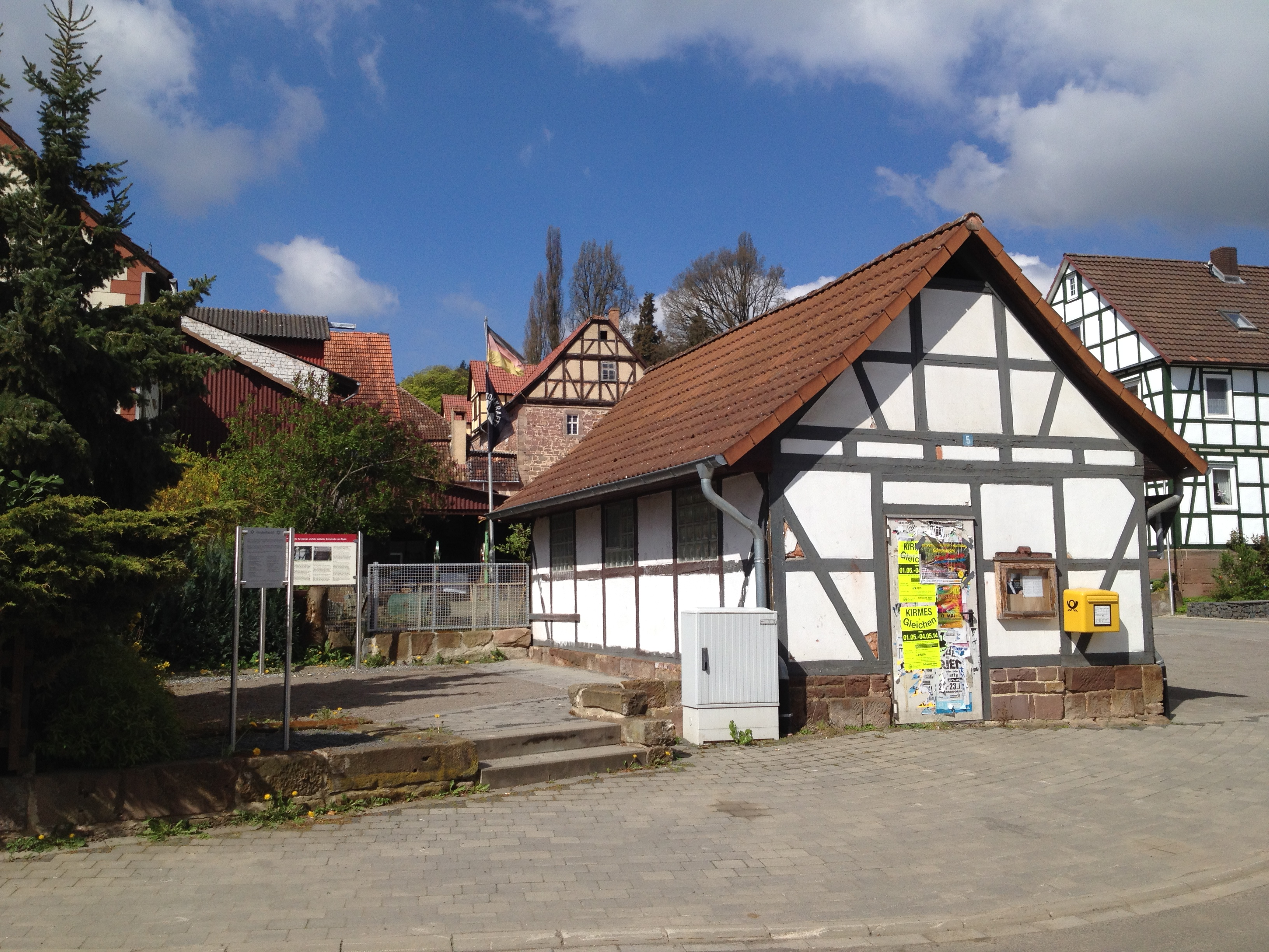 Station Synagoge und jüdische Gemeinde des Eco Pfades Friedenspädagogik Bad Emstal im Ortskern von Riede